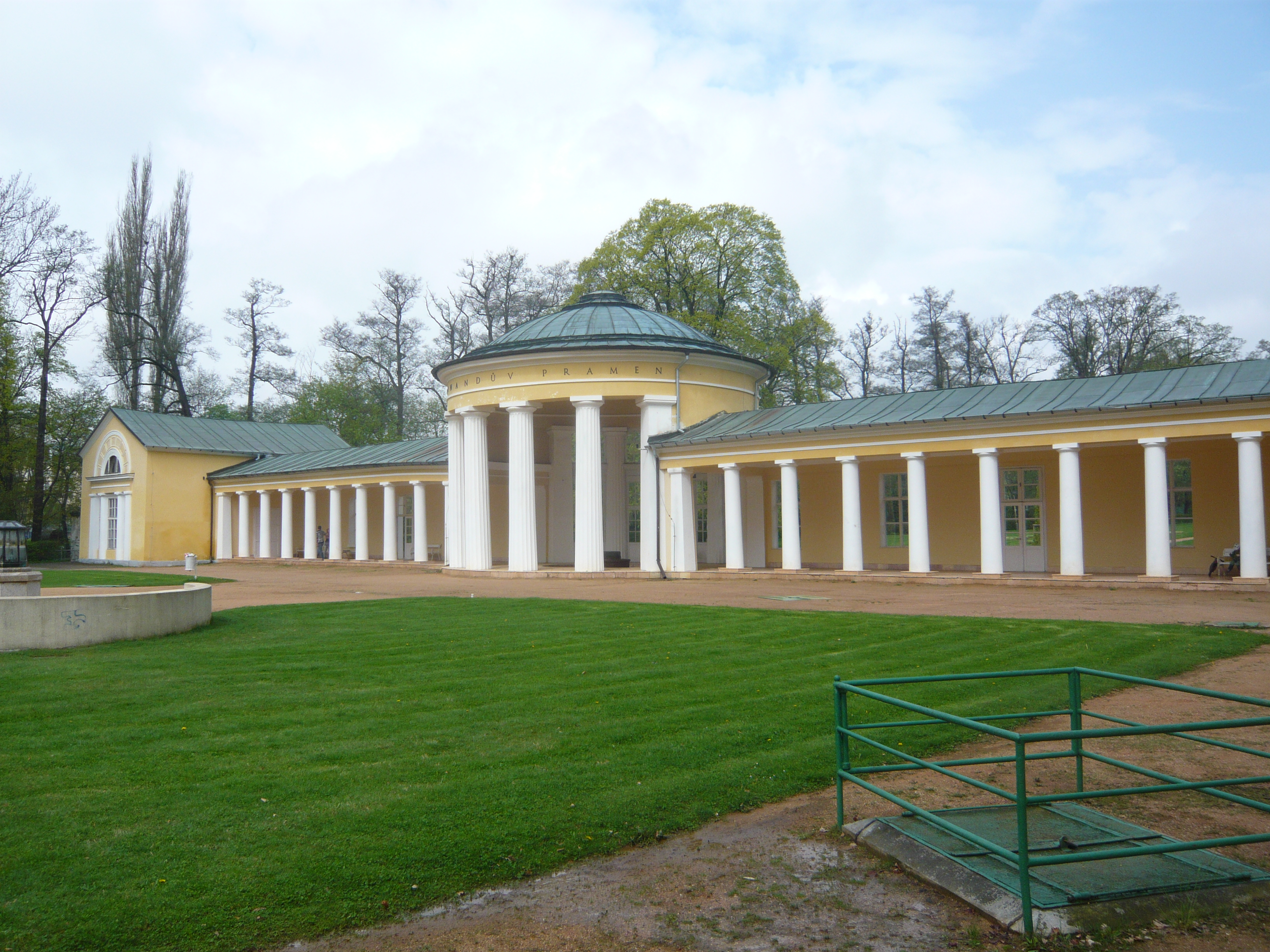 Ferdinandův pramen, Mariánské Lázně